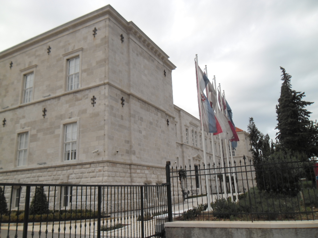 zgrada Sveučilišta u Dubrovniku